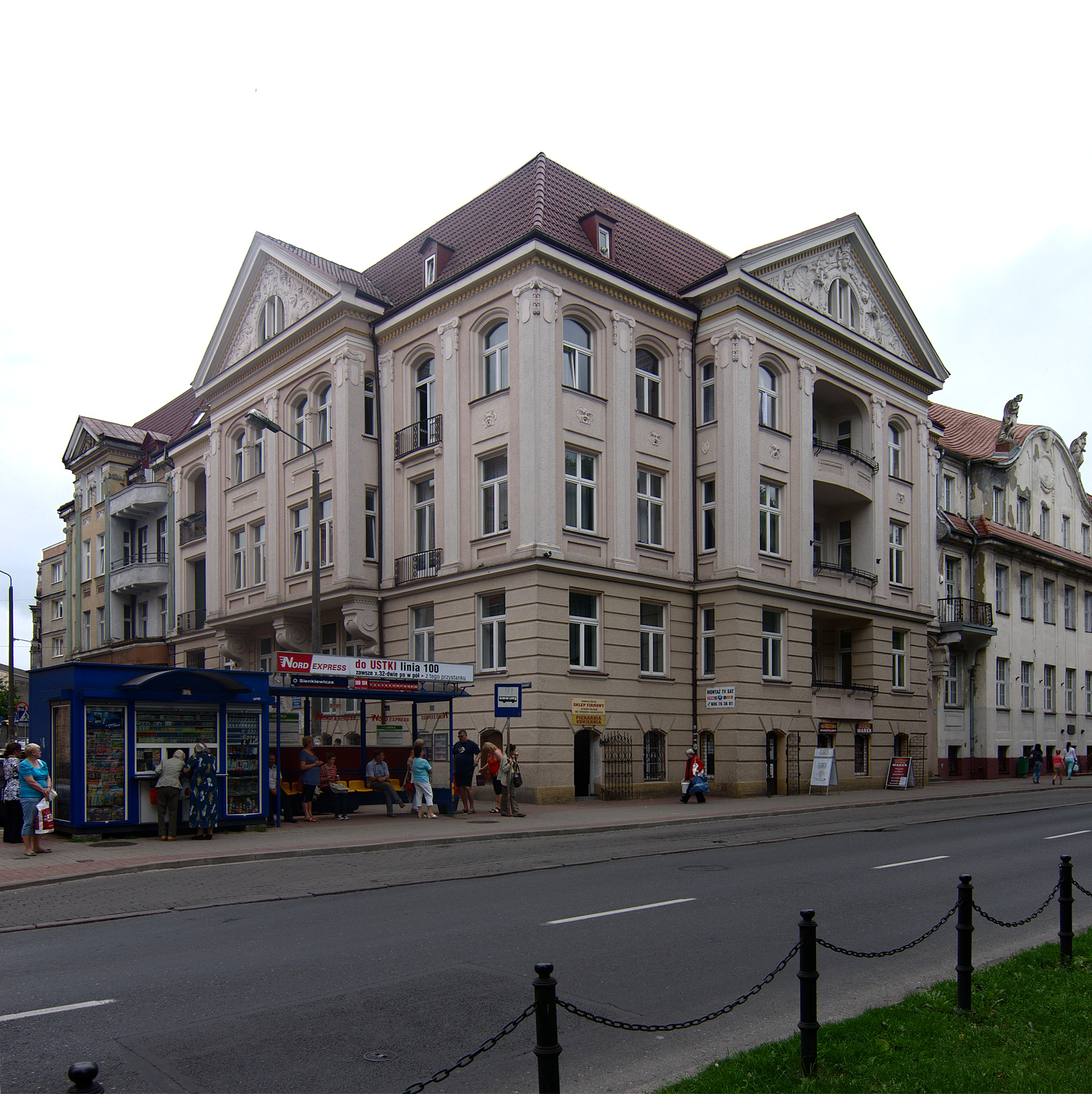 Słupsk. Sienkiewicza 18.